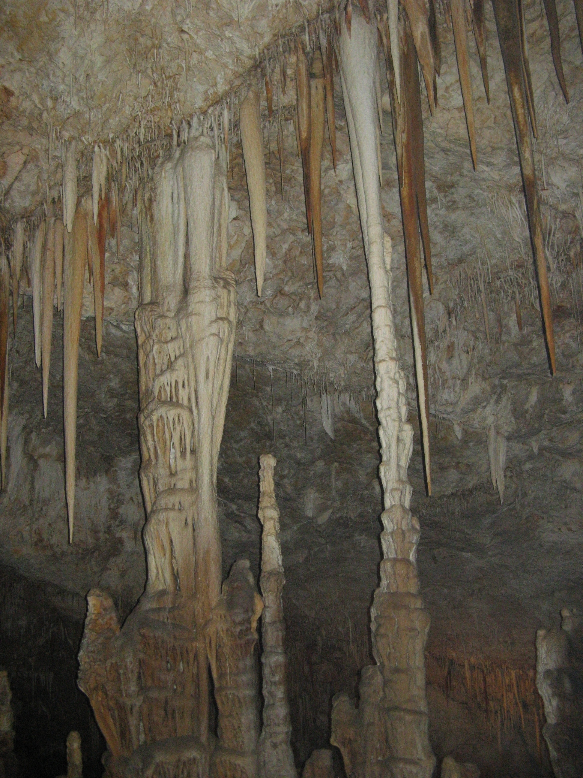 מערת סורק